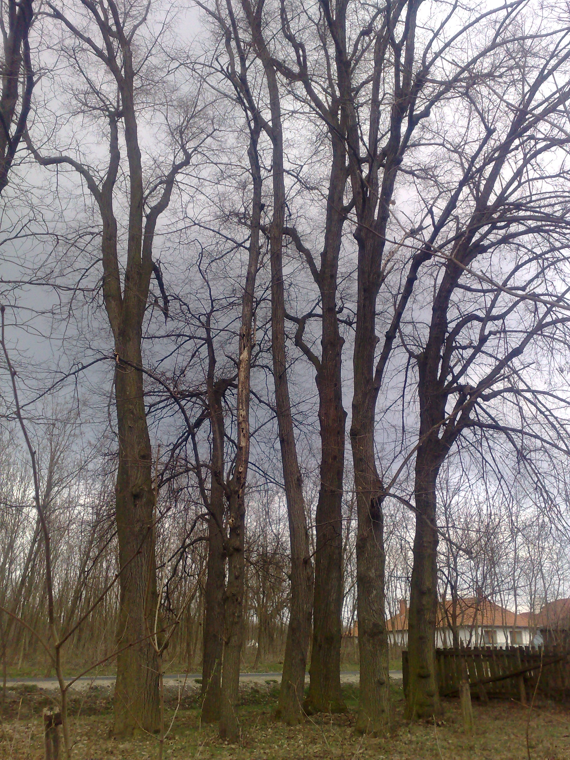 Egyed községben 1896-ban a honfoglaló magyarok hét vezérének emlékére ültetett 7 hársfa.